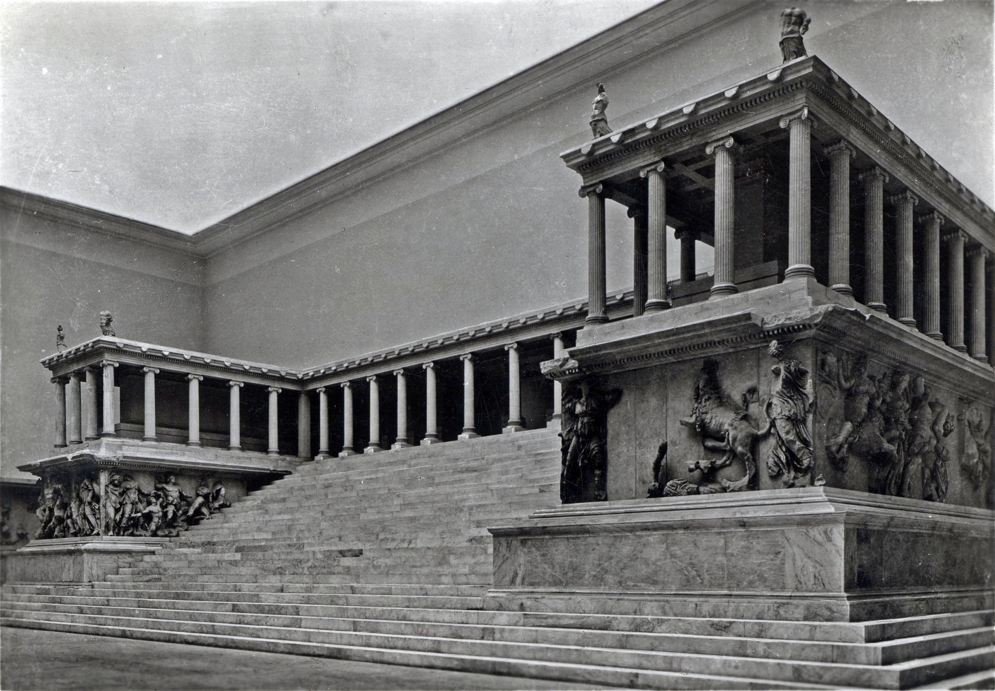 Bergama Müzesi’ndeki Zeus Sunağı, Berlin "Antik kentler tarihinde, Pergamon gibi, eserleri başka ülkeler tarafından yağmalanmış kent azdır. Osmanlı İmparatorluğu’nun zor günlerinde, alınan sınırlı, küçük kazı izinlerine karşın büyük çaplı eserler kontrolsüz biçimde Berlin’e taşınmıştır." Yaşar Yılmaz, "Türkiye’nin Antik Kentleri", İstanbul: YEM Yayın, 2014 SALT Araştırma, Ali Saim Ülgen Arşiv